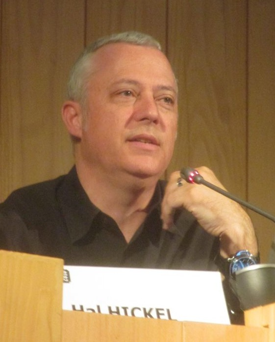 Hal Hinkel au festival international du film d'animation d'Annecy 2016